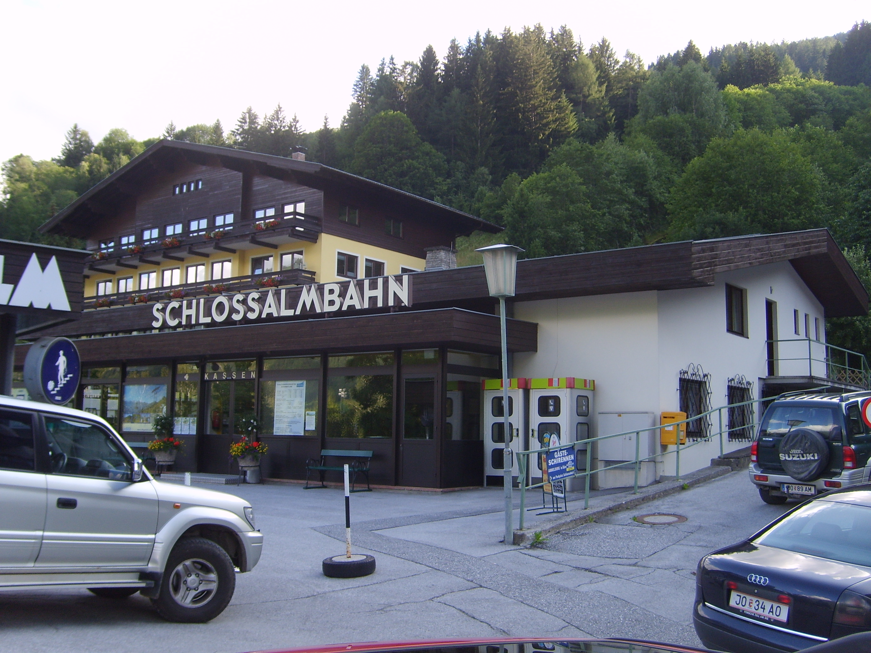 Hier sieht man die Talstation der Schlossalmbahn. Das Foto wurde in Bad Hofgastein, Össterreich aufgenommen.